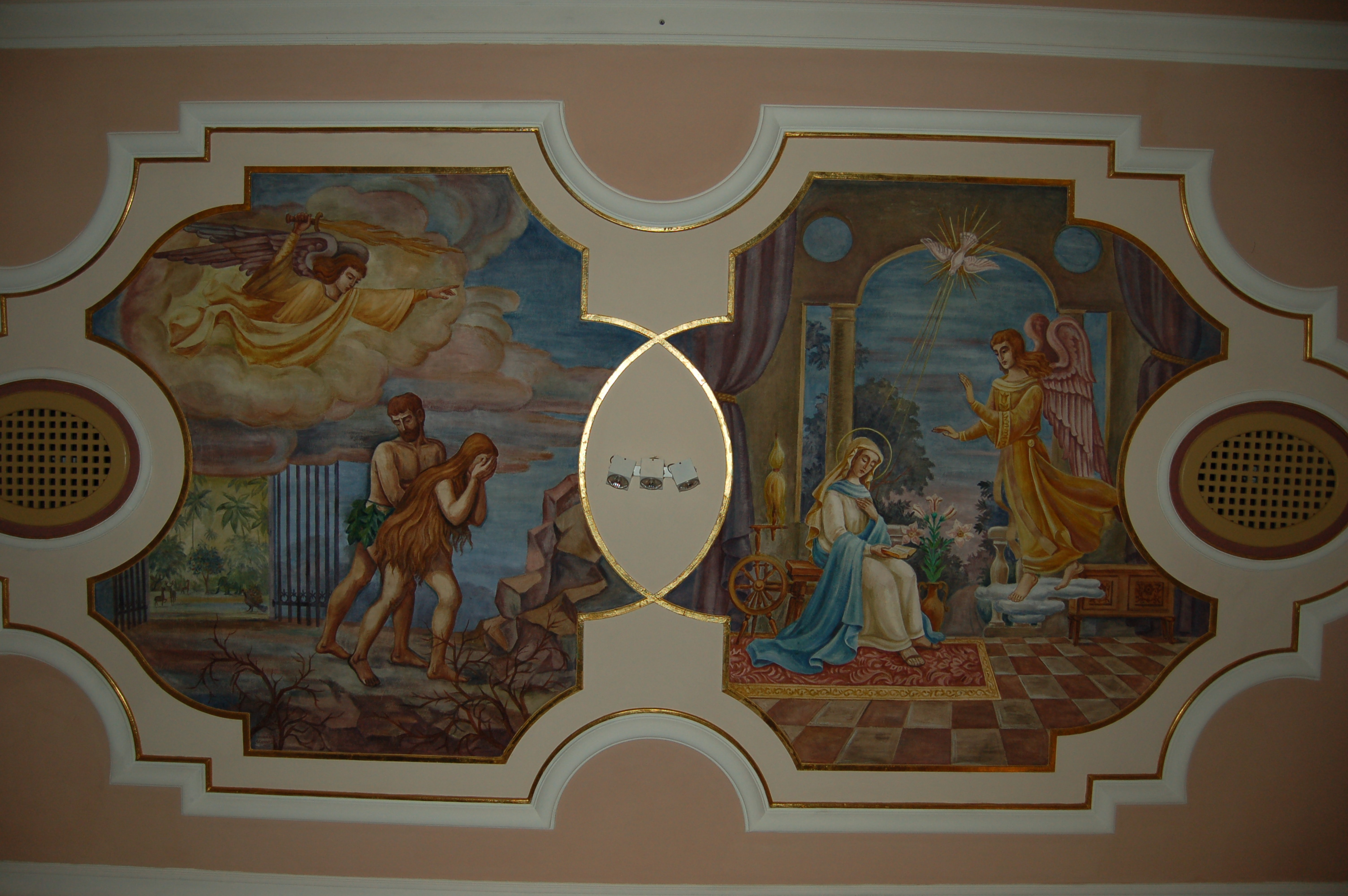 Freski ze stropu kościoła św. Krzyża w Rumi